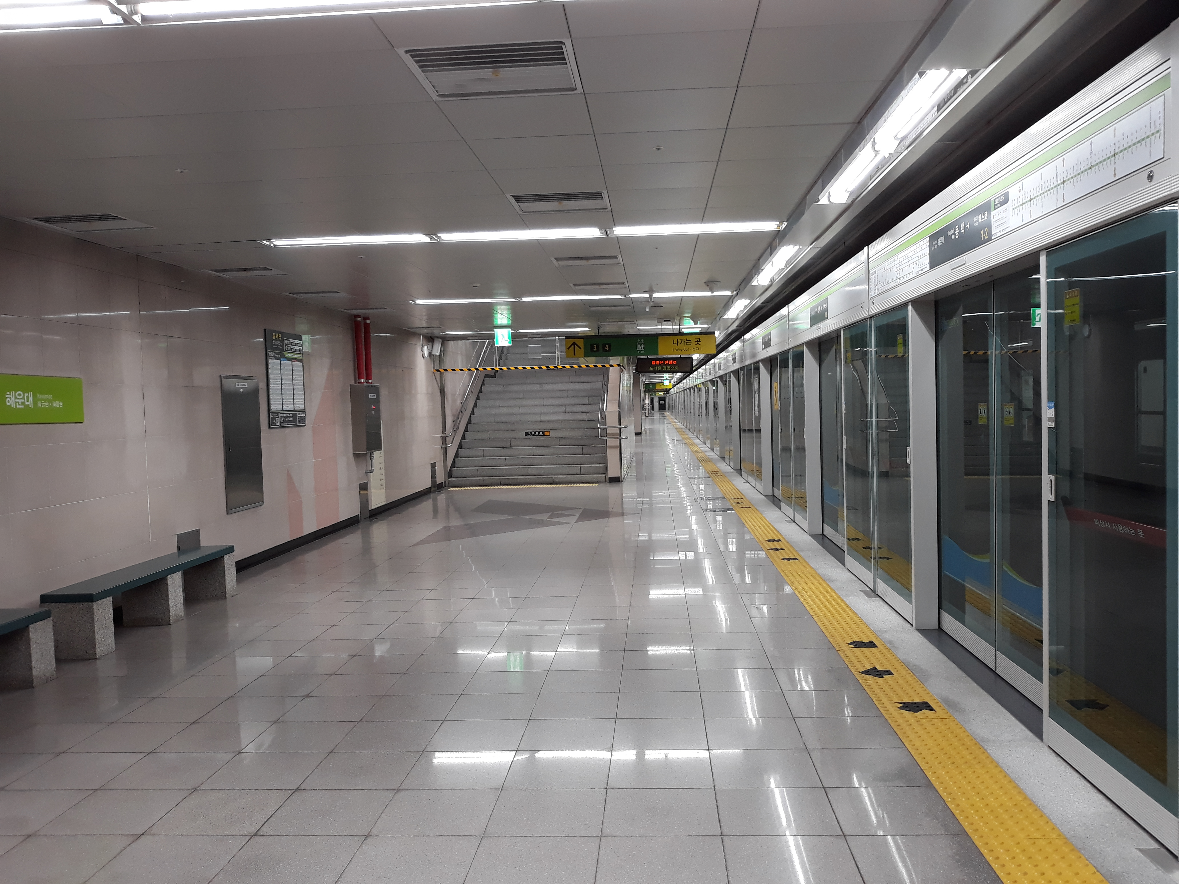 부산 도시철도 2호선 동백역 양산 방면 승강장